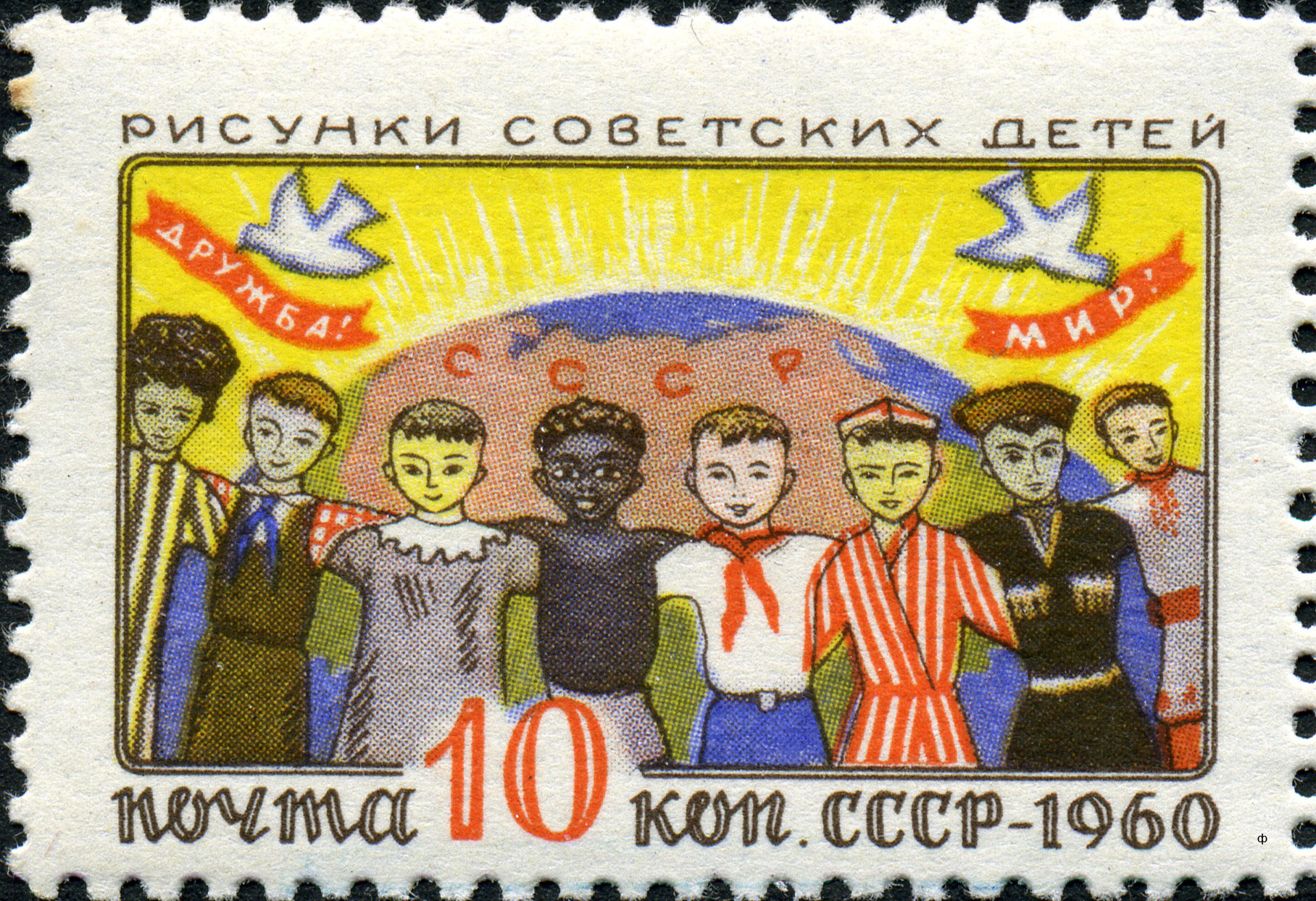 Timbre soviétique. Légende : Amitié (Дружба) ! Paix ! URSS-1960